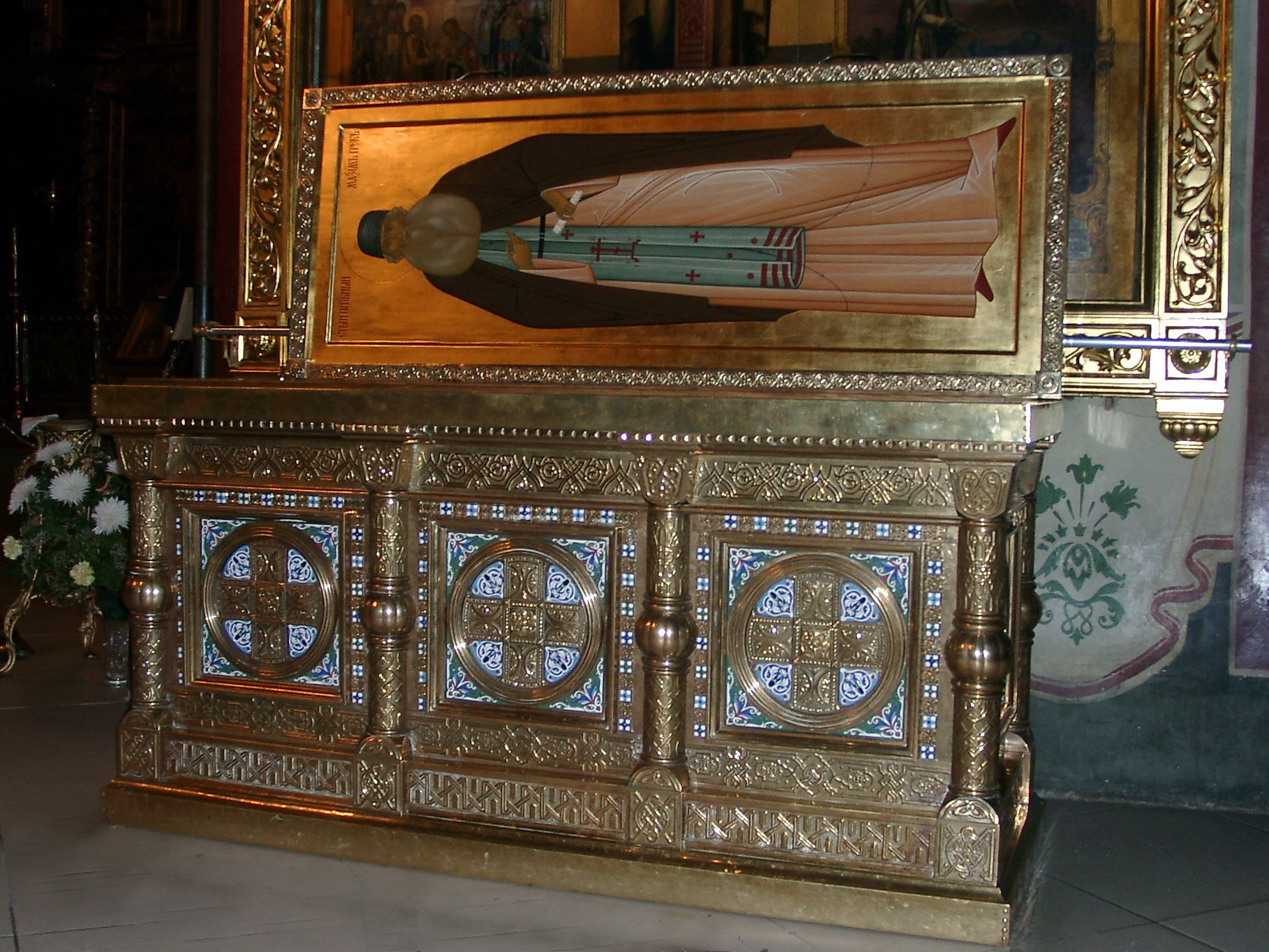 Рака с мощам.Троице-Сергиева Лавра. Архитектор Звёздкин Виталий Александрович